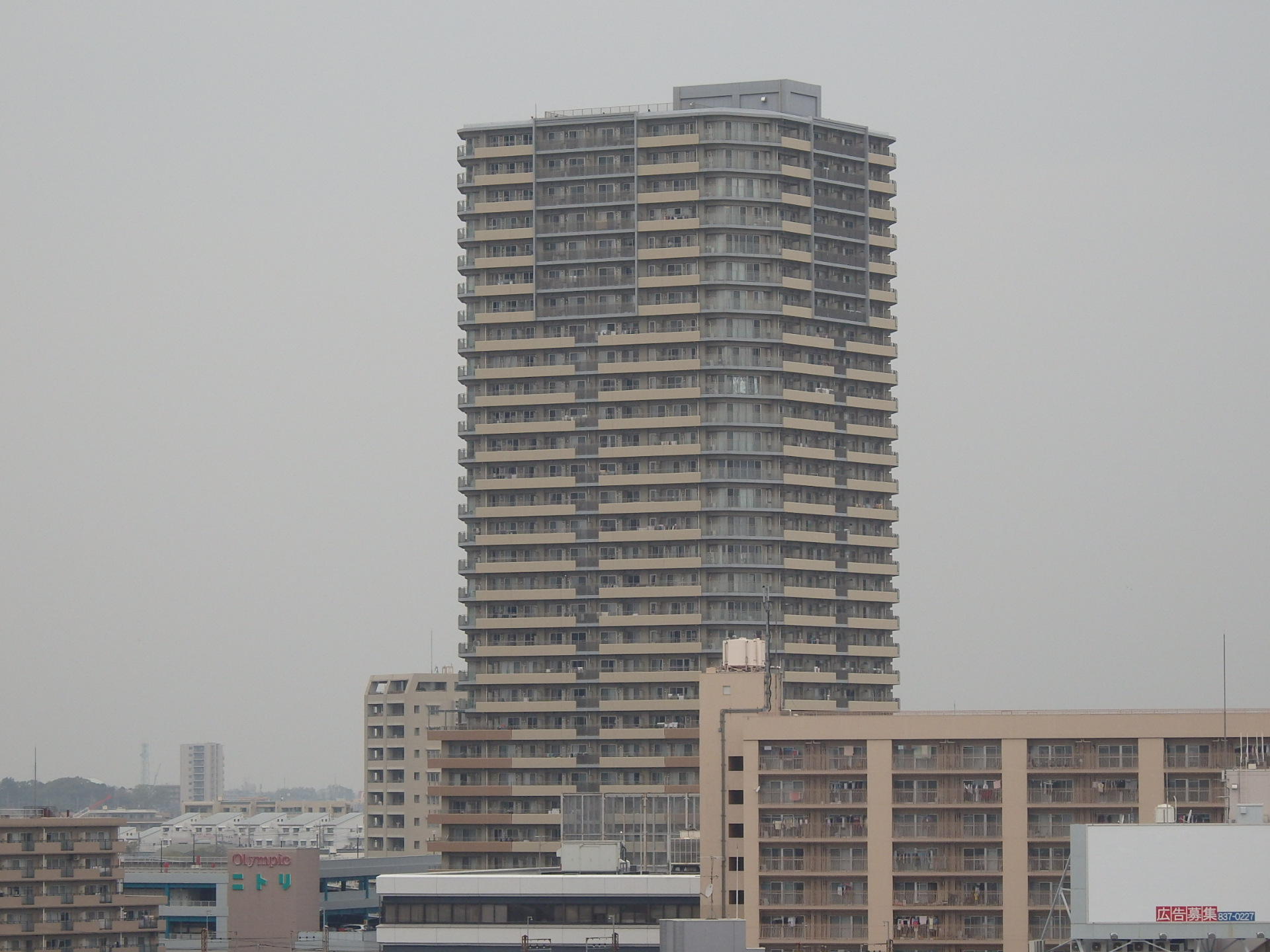 MUSE CITY ザ・ファーストタワー南側